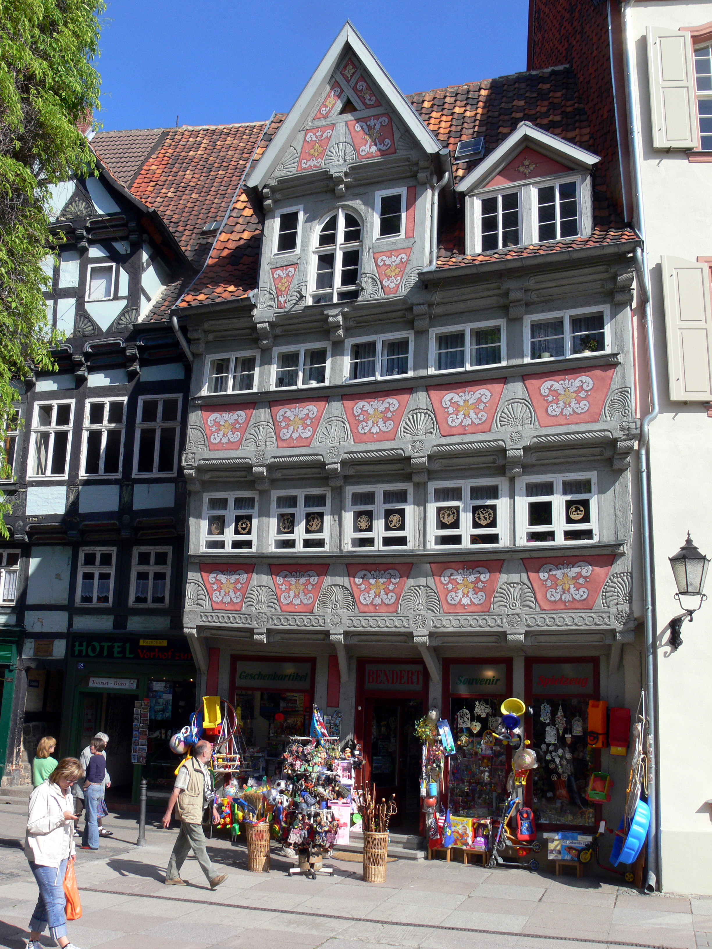 Haus Breite Straße 53 in Quedlinburg. Fachwerkhaus von 1560 (Frührenaissance) Fassadenbemalung mit Akanthusmotiven aus dem 17. Jh.